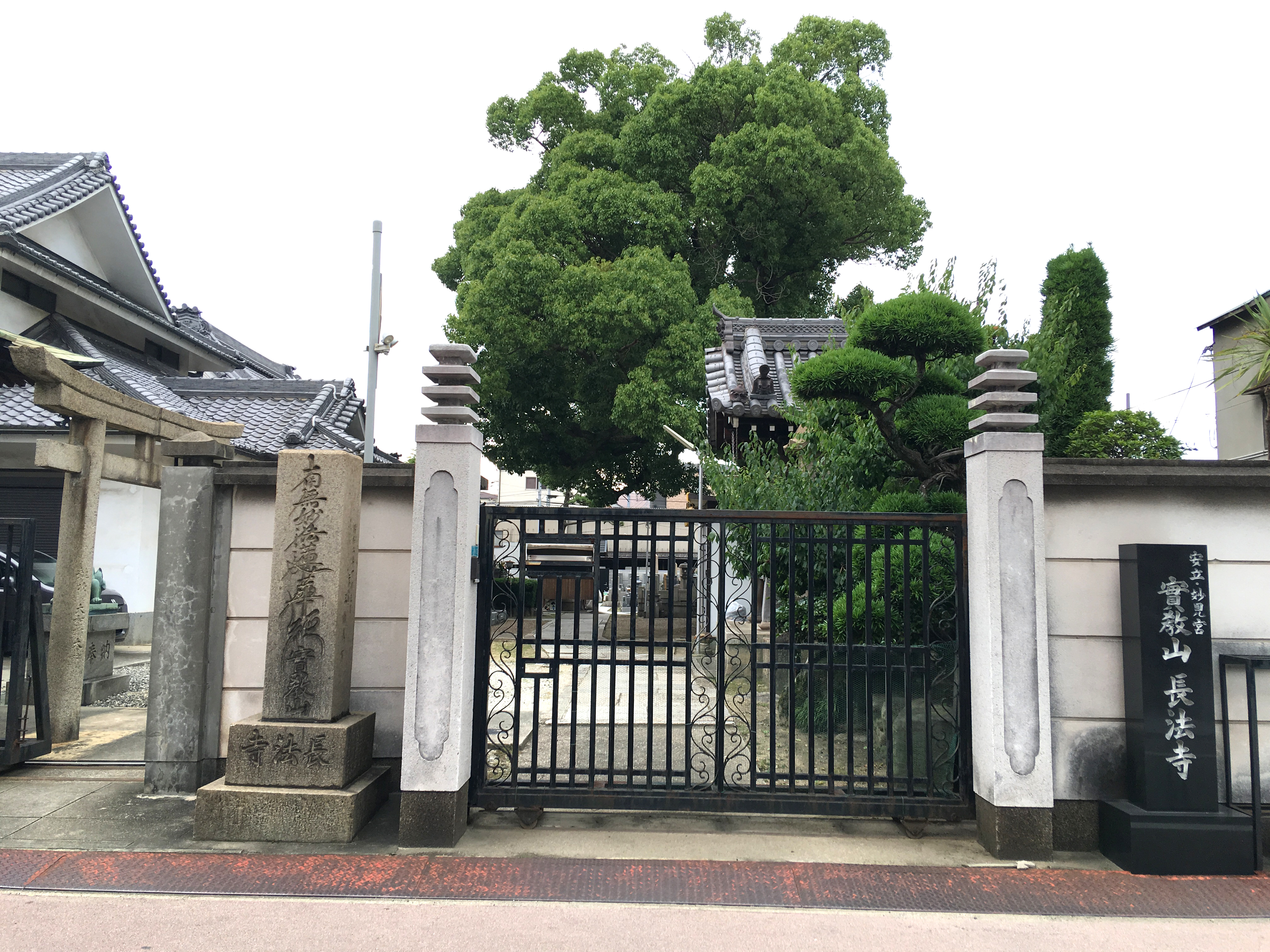 実教山 日蓮宗